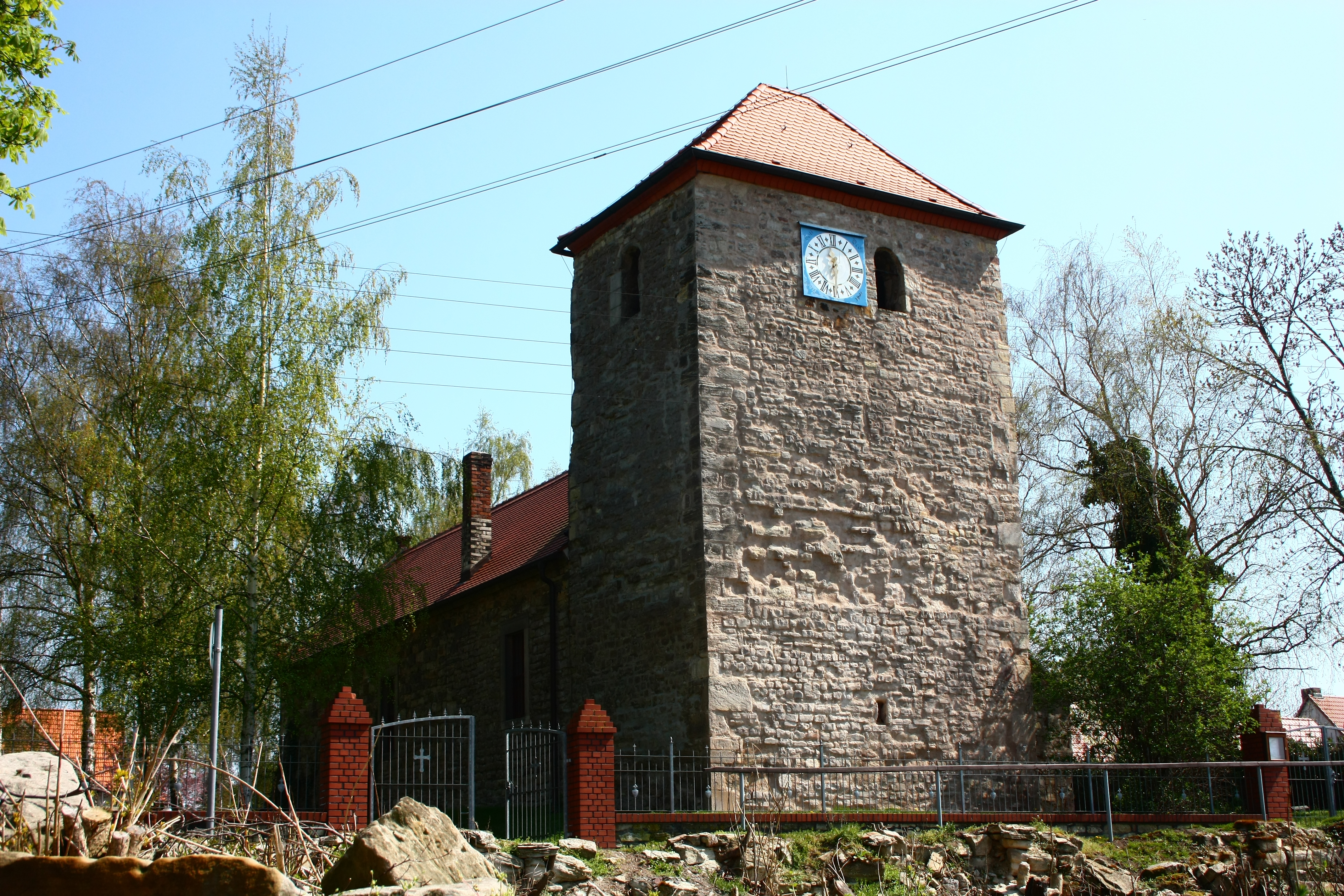 die Dorfkirche von Burgsdorf